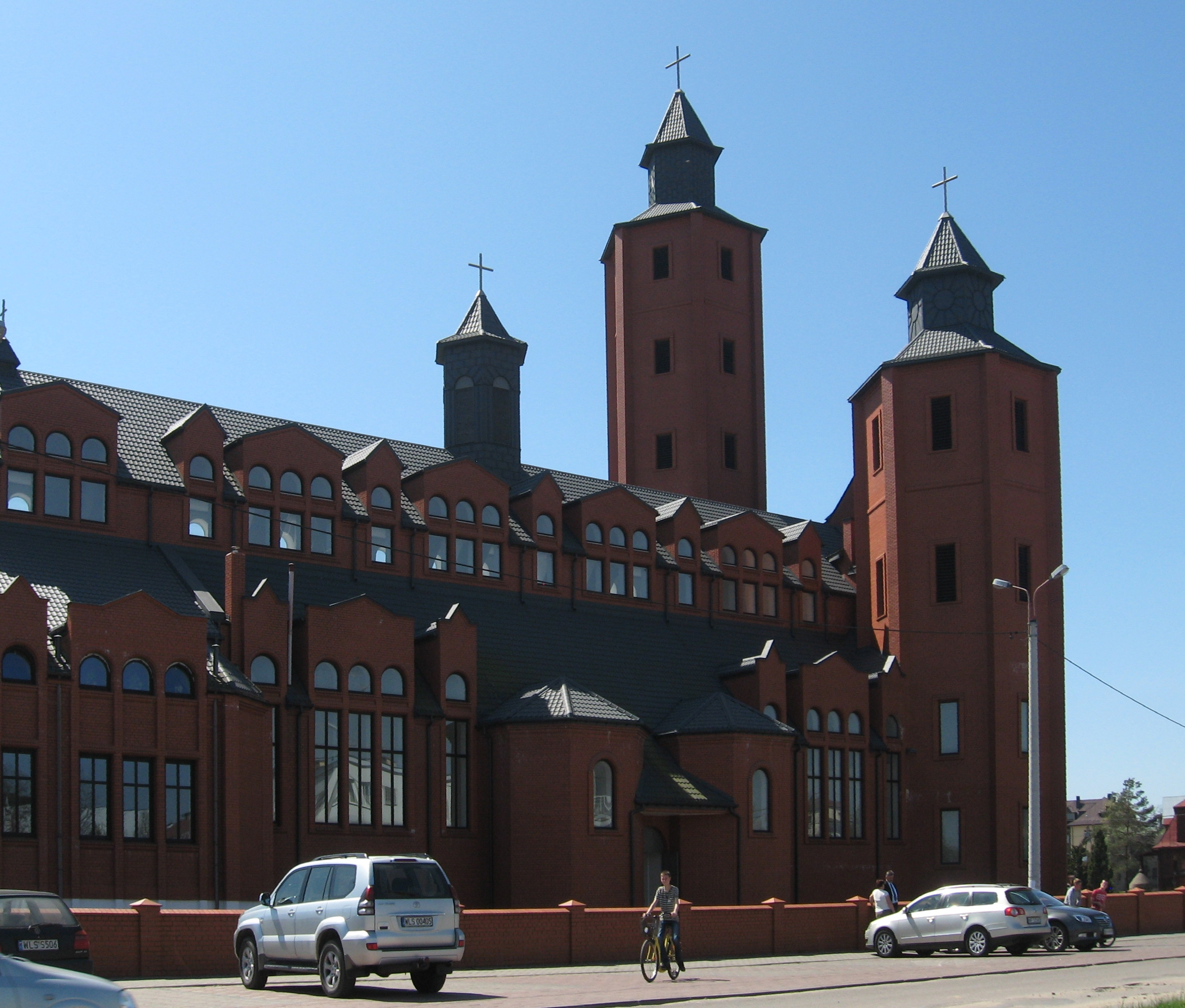 Kościół św. Trójcy w Łosicach